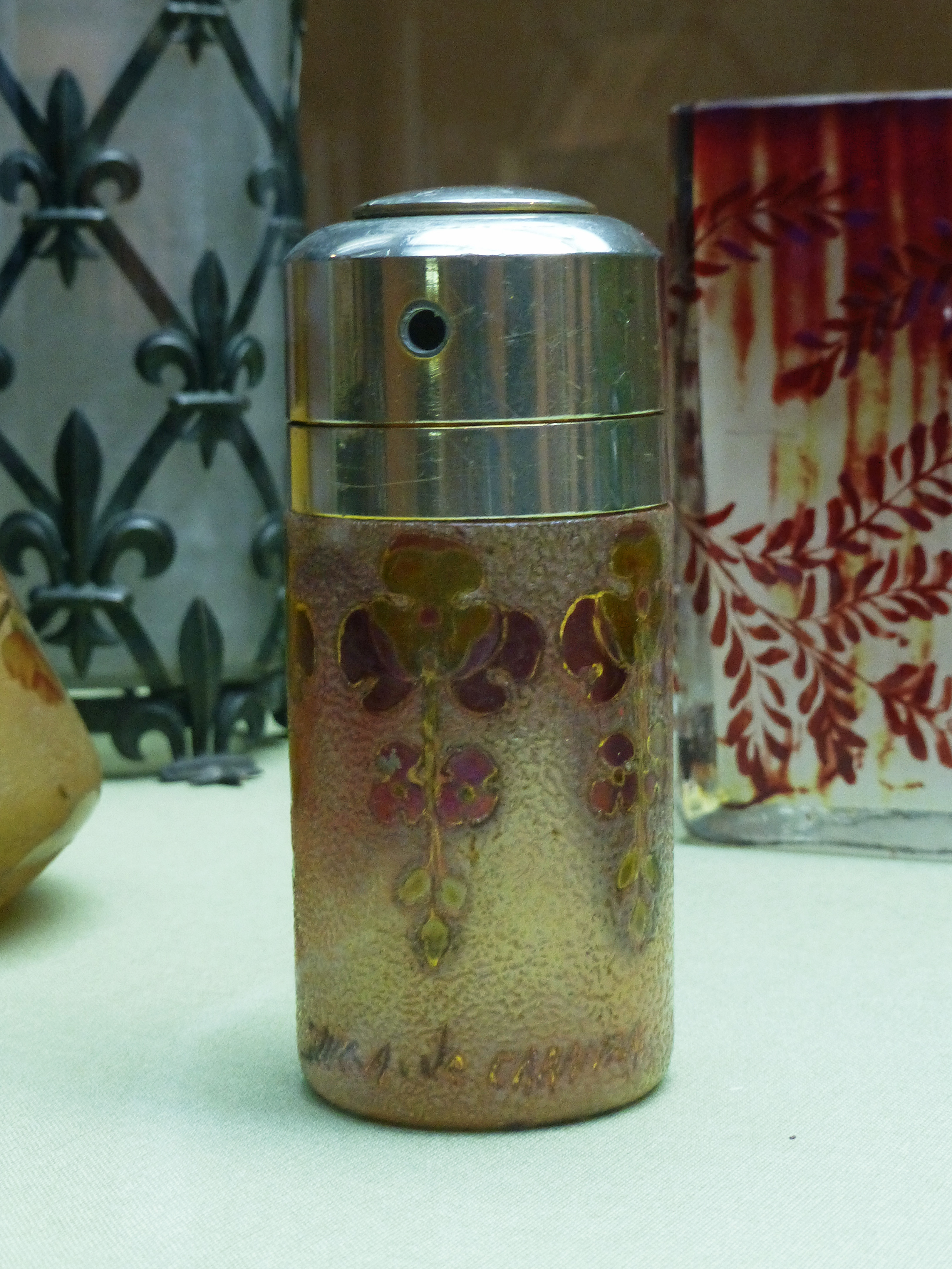 Amédée de Caranza : vaporisateur en verre soufflé teinté à décor floral irisé métallisé. H : 10 cm. Vers 1900. Signé Duc A. de Caranza. Musée historique de Haguenau.